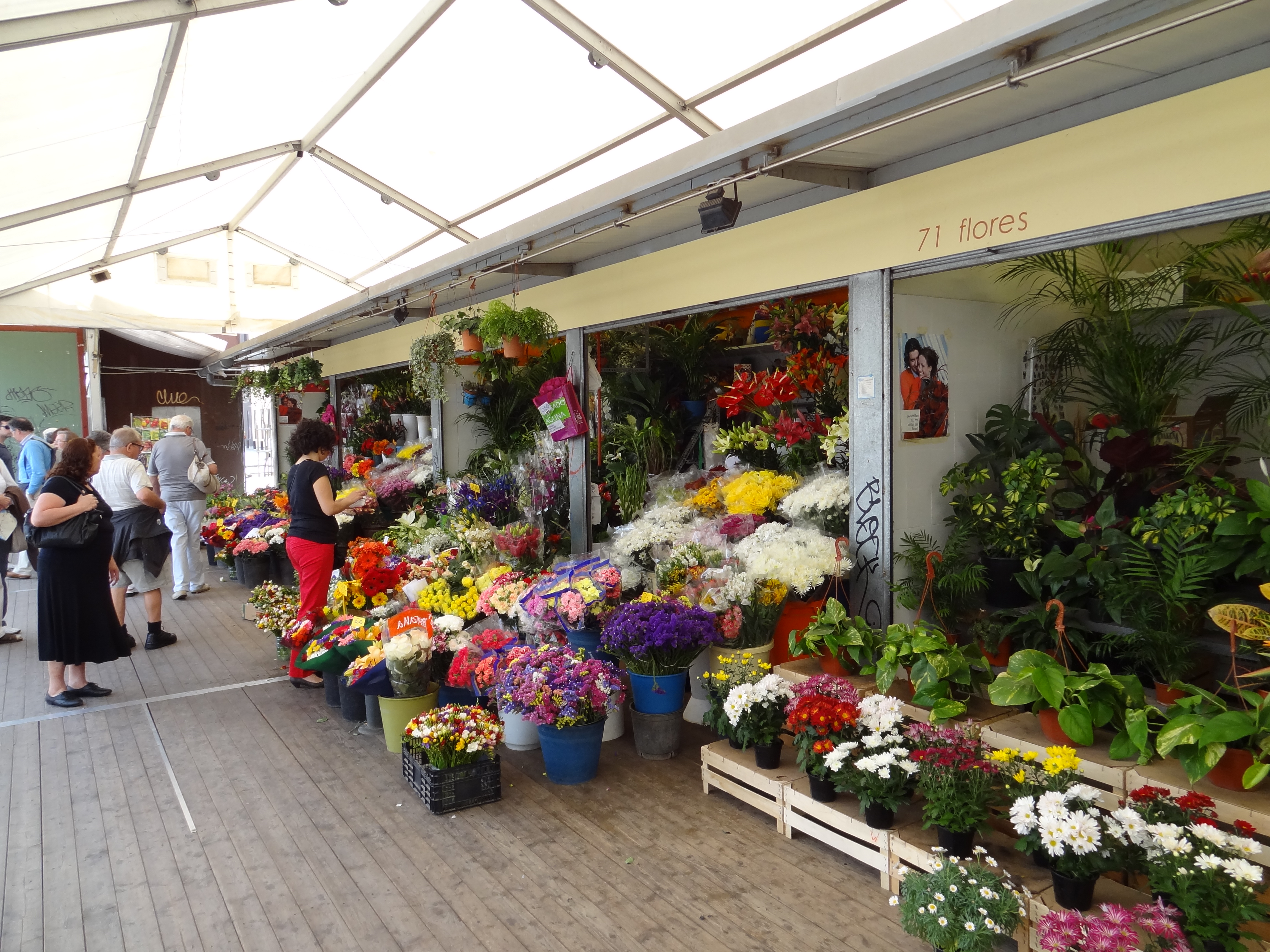 Bloemenverkoop in overdekte markt in San Cristóbal de La Laguna, Tenerife.